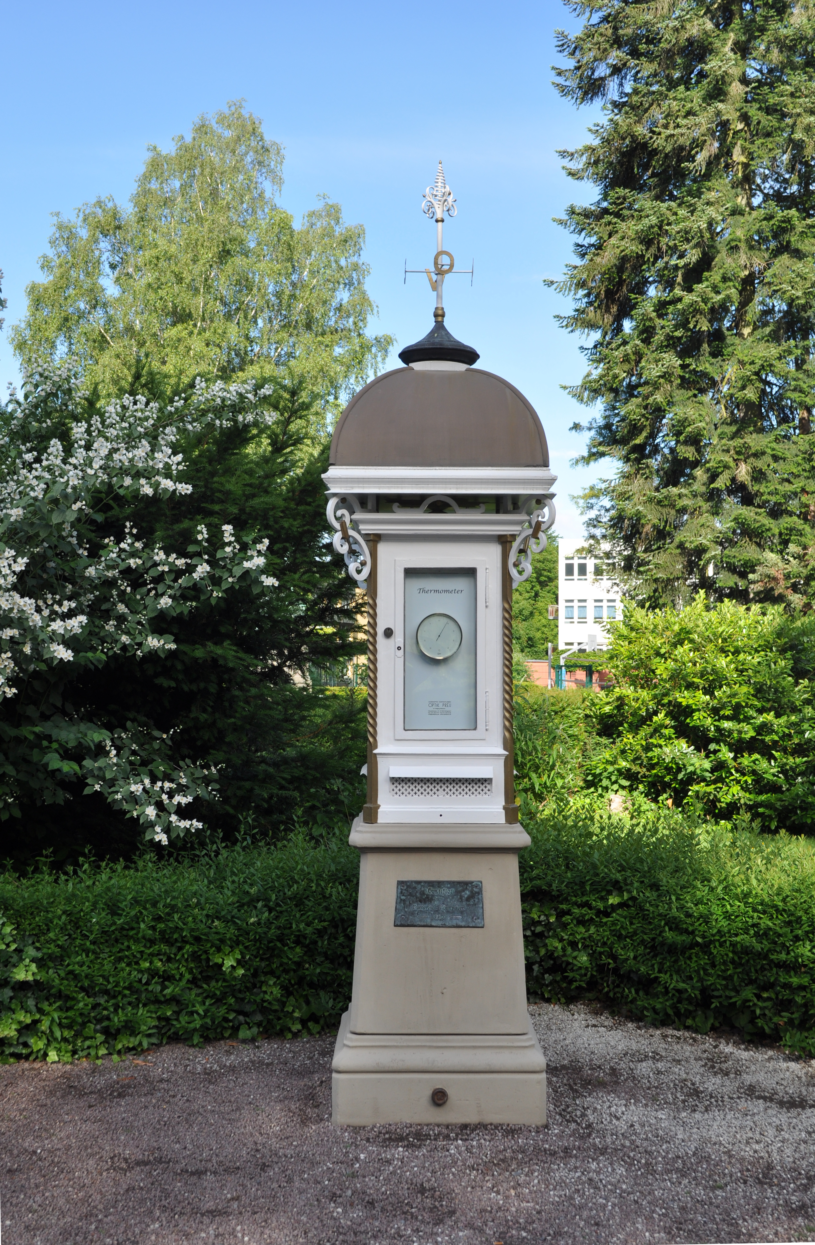 Königstein, Wettersäule der Firma Wilhelm Lambrecht von 1910. Es handelt sich um das Modell III "Tourist", das 1910 einen Preis von 500 Mark hatte. Die Instrumente sind nicht original, die Säule wurde 2012 saniert.